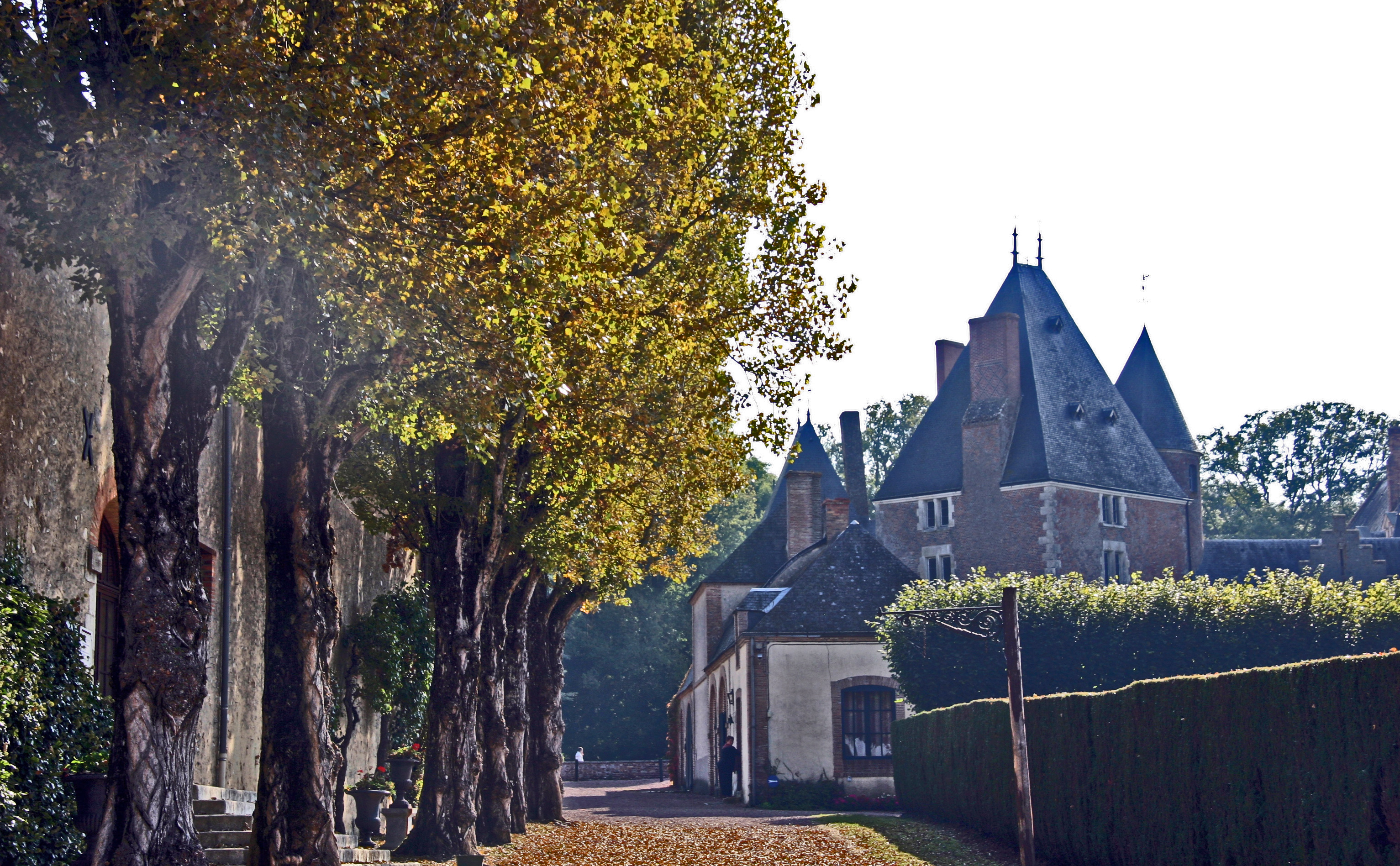 Schloss in Blancafort